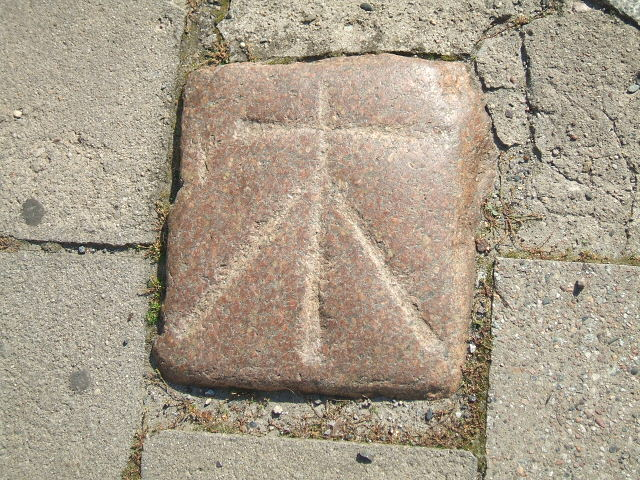 Stralsund,_Germany,_Neuer_Markt,_Pflasterstein_(2006-09-15)